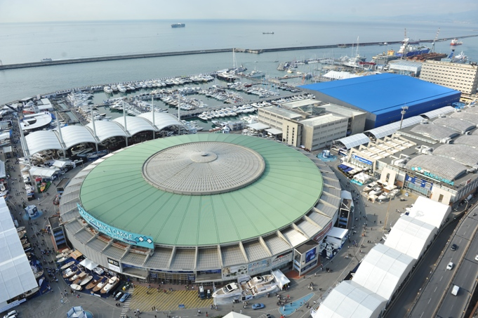 La Fiera di Genova vista dall'alto